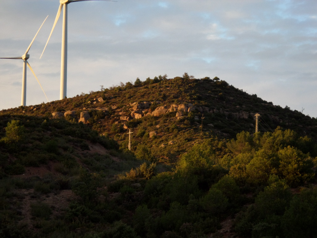 Cim de la Còpia de Palomes (837 metres)